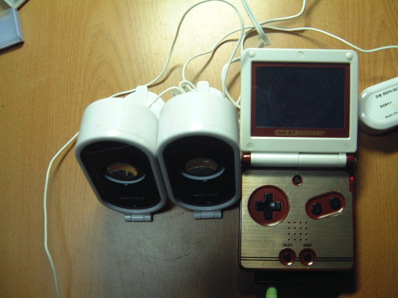 投稿者所有物